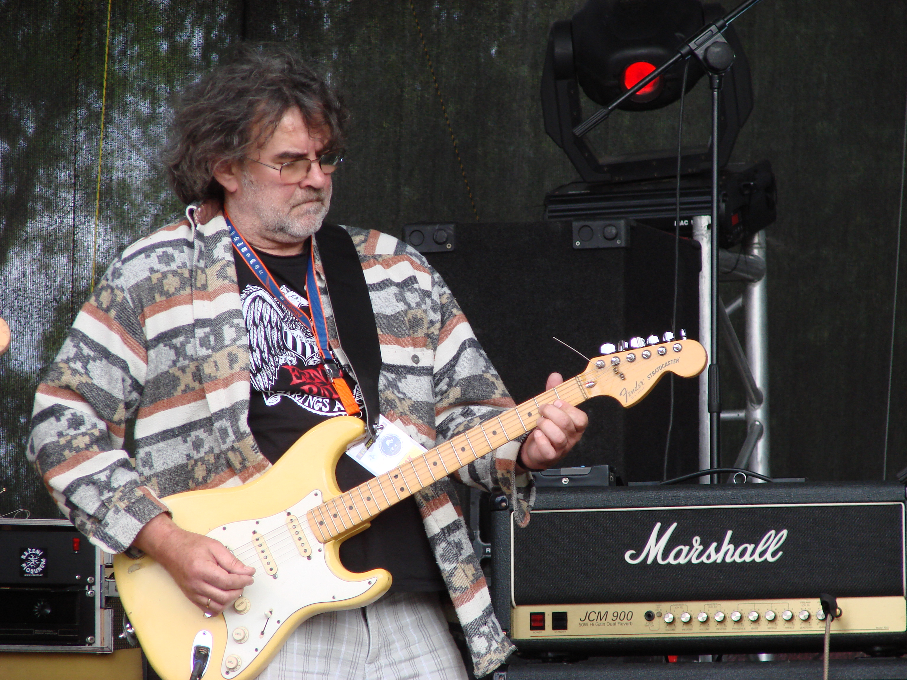 Festiwal odbył się w dniach 24-25 lipca 2009 w Chorzowie na terenie Pól Marsowych w WPKiW.